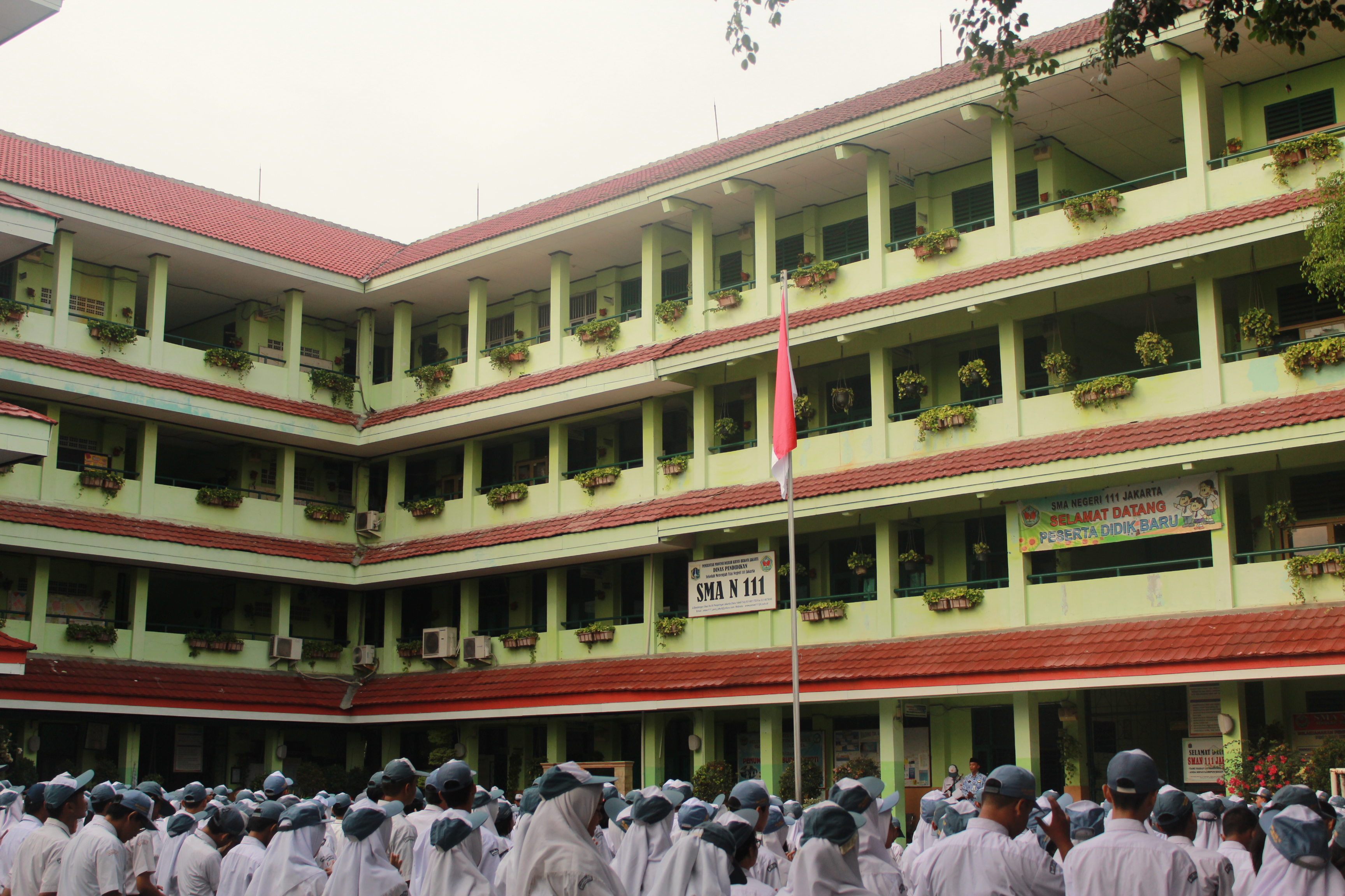 Siswa/i SMA Negeri 111 Jakarta saat melaksanakan Upacara